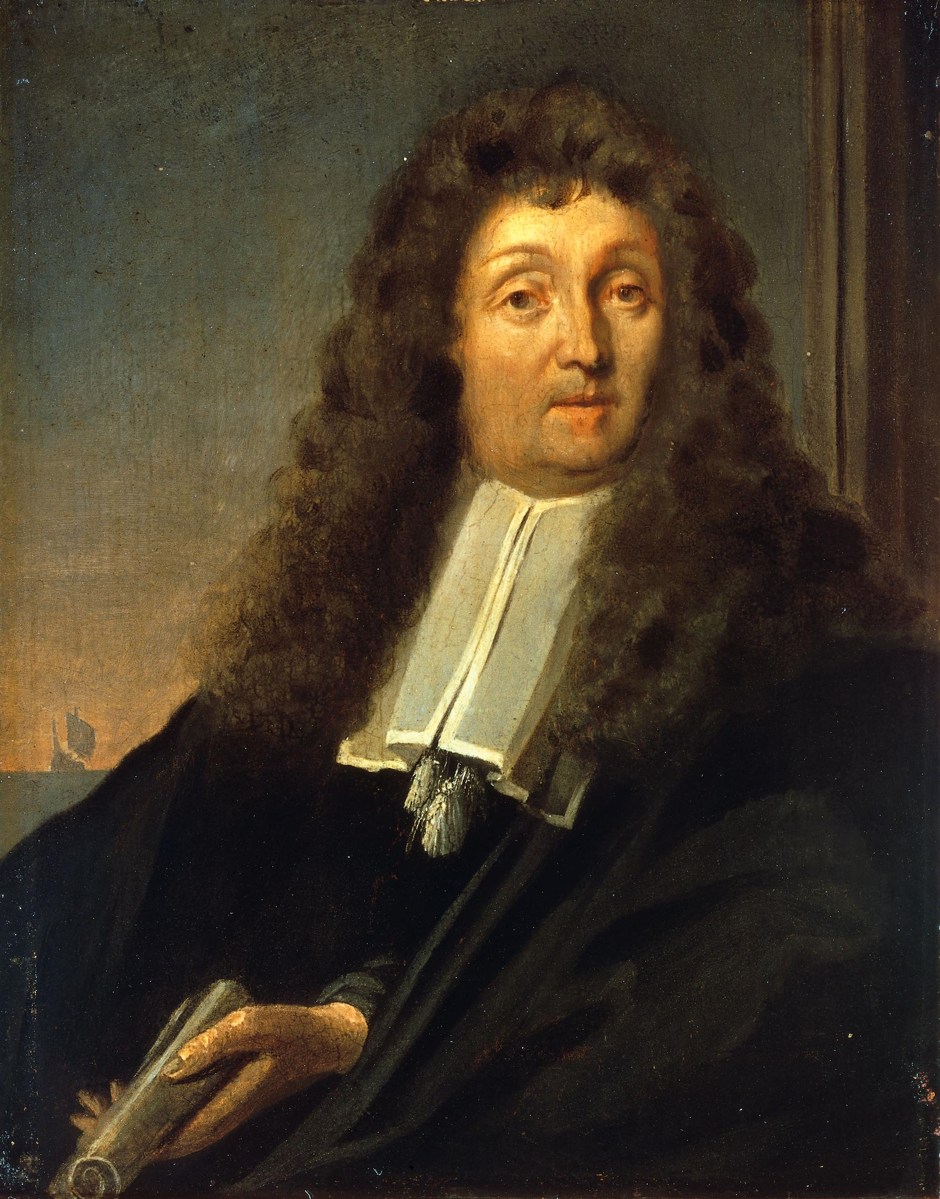 Self-portrait by Ludolf Bakhuizen (1631-1708). Pendant of File:Anna de Hooghe (1645-1717). Vierde echtgenote van de schilder. Rijksmuseum SK-A-2187.jpeg